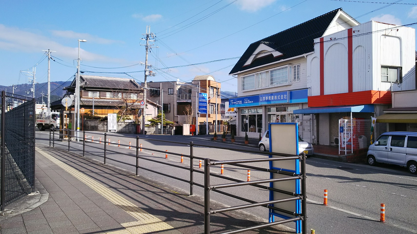 御幸辻駅東口全景